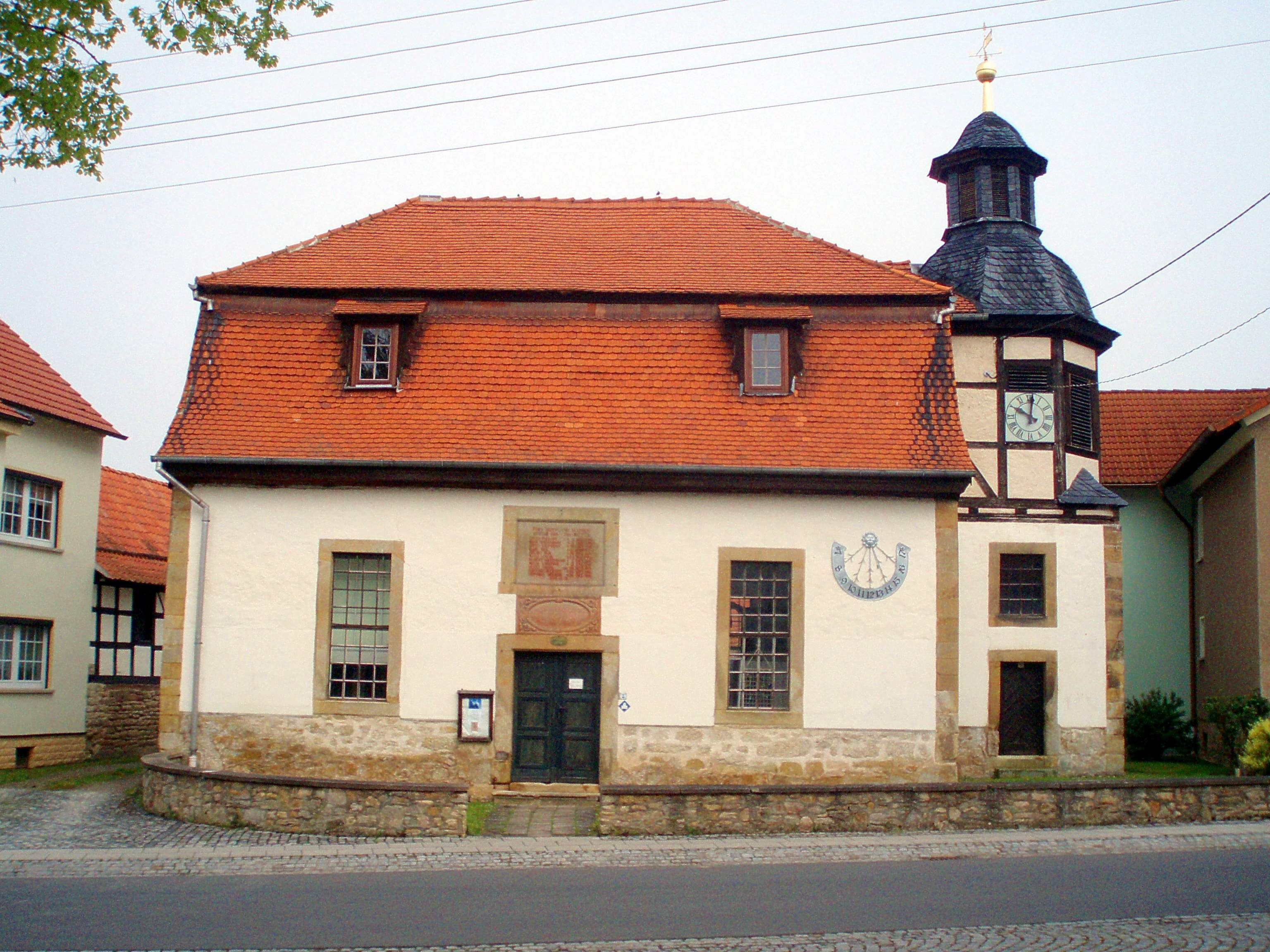 Kirche Spichra